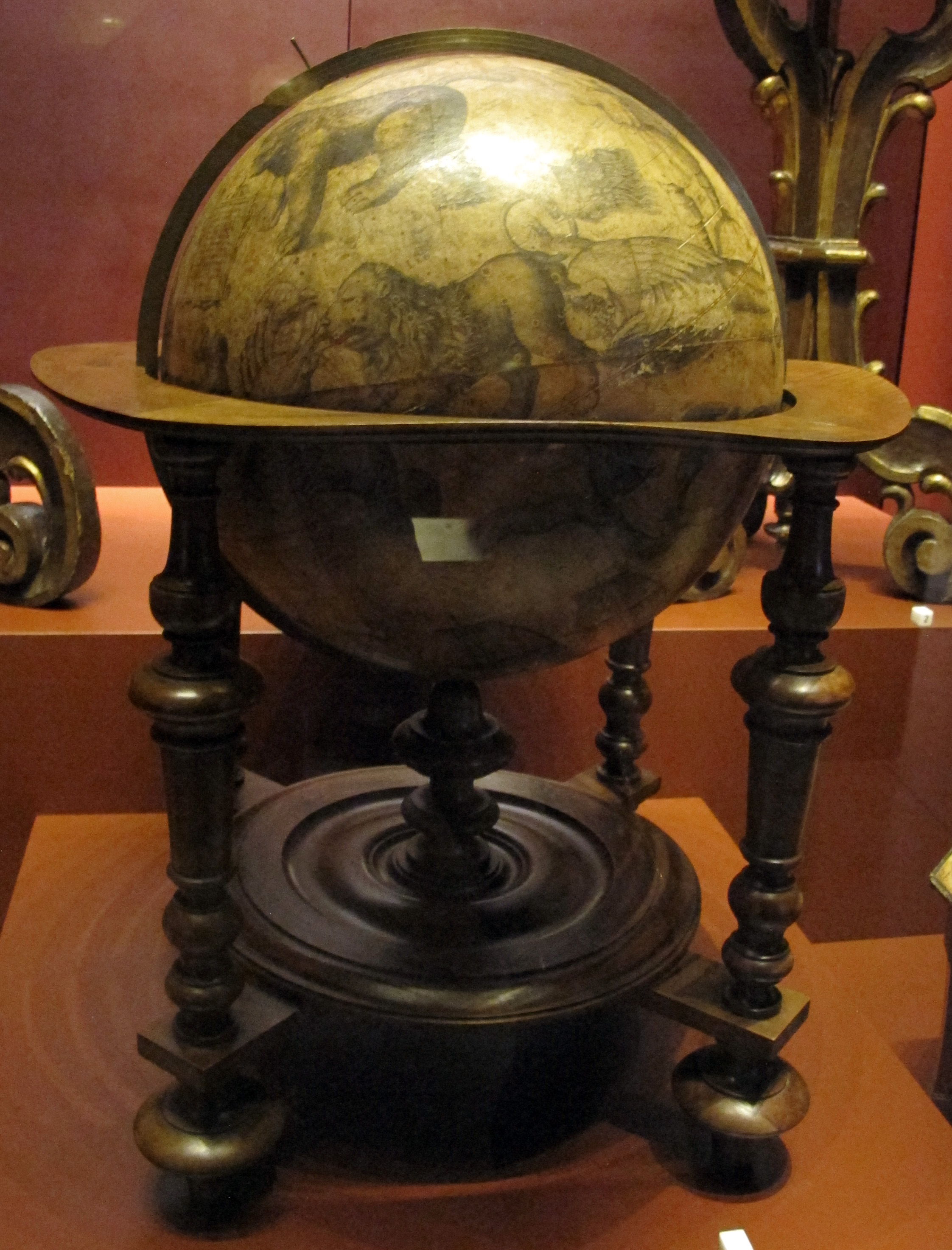 Museo Galileo, Firenze